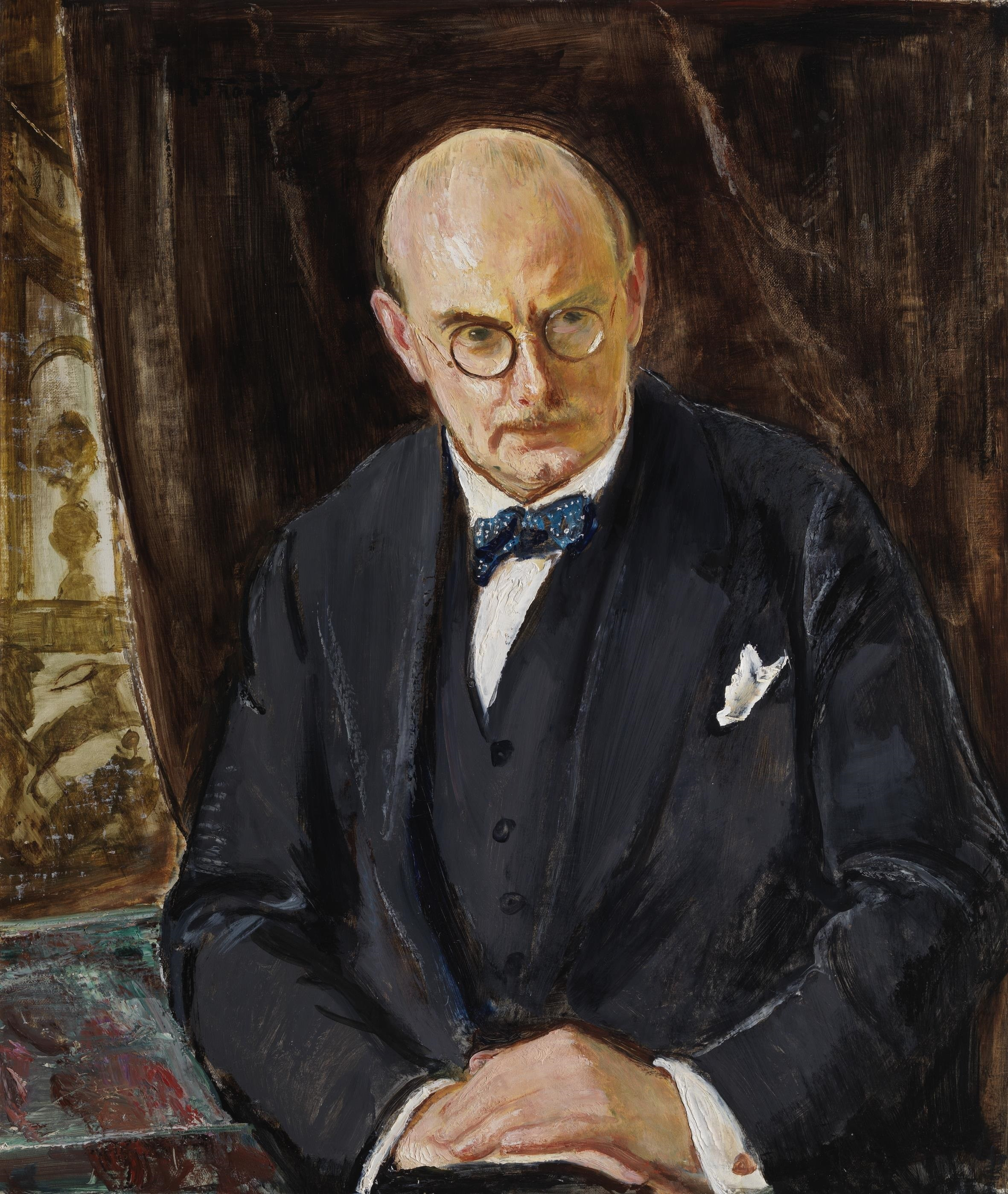 Retrato del médico y científico florentino Gustavo Pittaluga Fattorini (1876-1956).